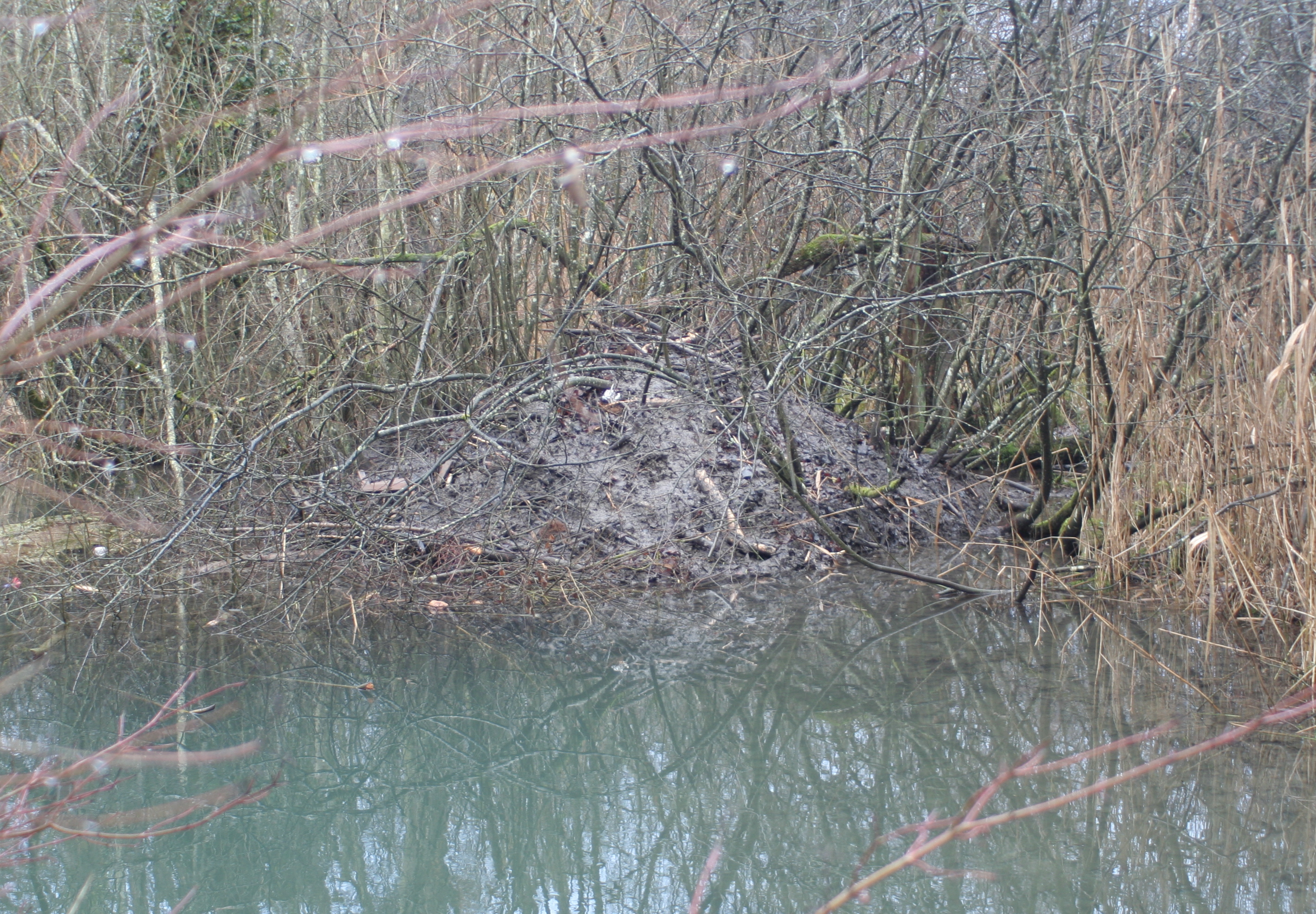 Freistehende (schwimmende) und bewohnte Biberburg in der Schweiz.